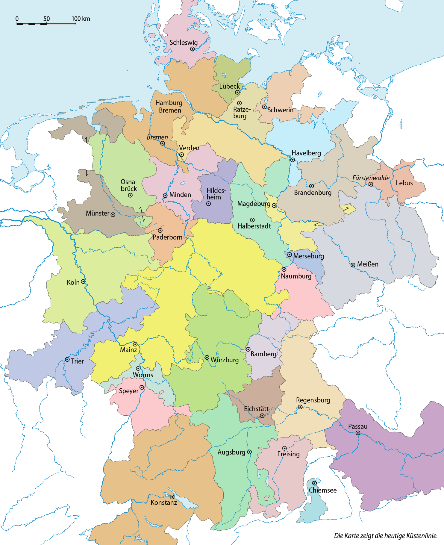 Karte der katholischen Diözesen in Deutschland vor 1517; eingezeichnet sind alle Diözesen, deren Sitz auf dem Gebiet des heutigen Deutschlands liegen